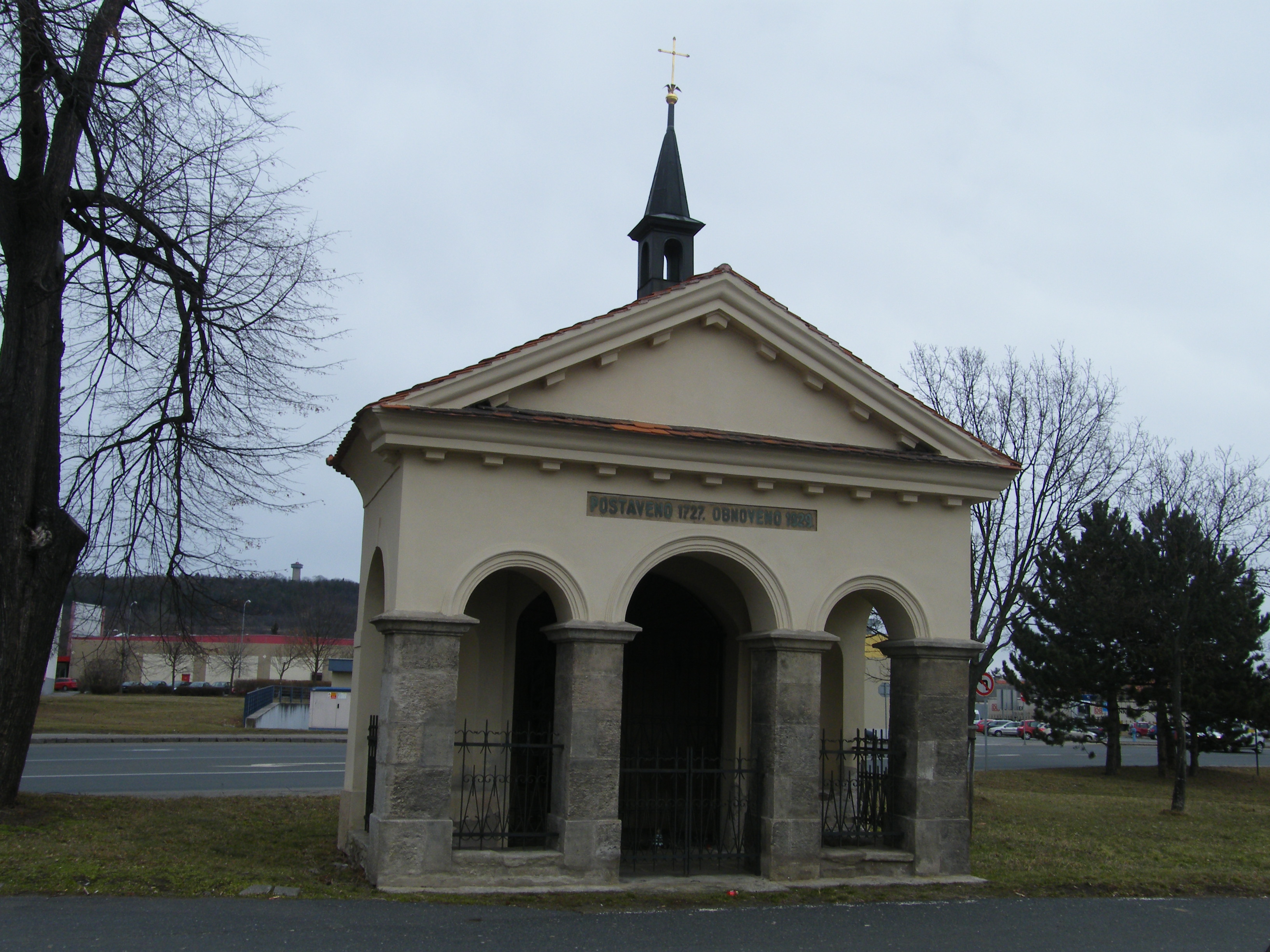 Kaple se sochou Krista (Sedlec)